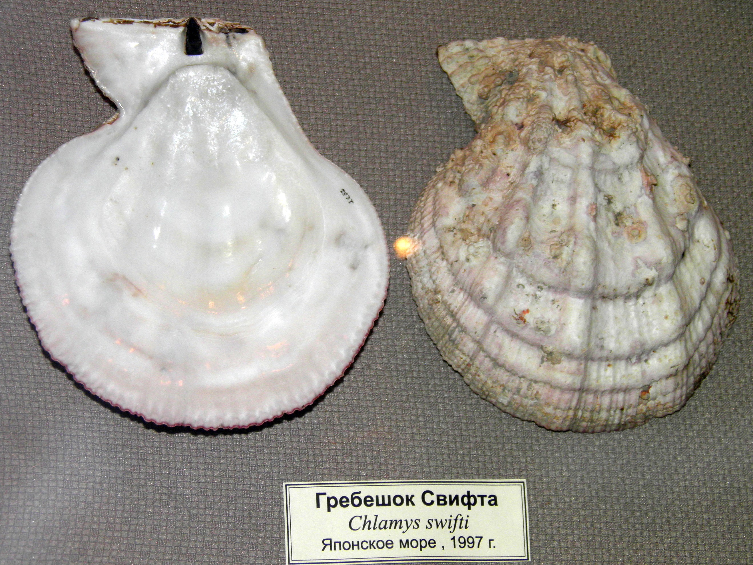 Гребешок Свифта (Swiftopecten swiftii) в Научном музее ДВФУ (г. Владивосток)